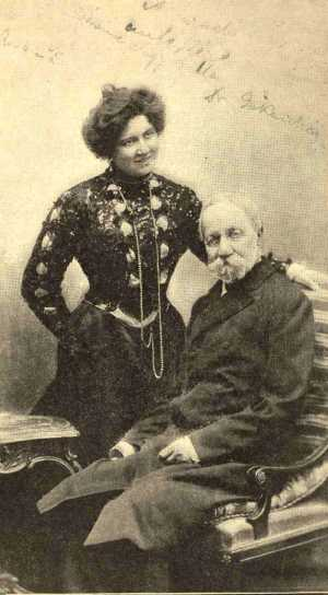 Jókai Mór és felesége Nagy Bella